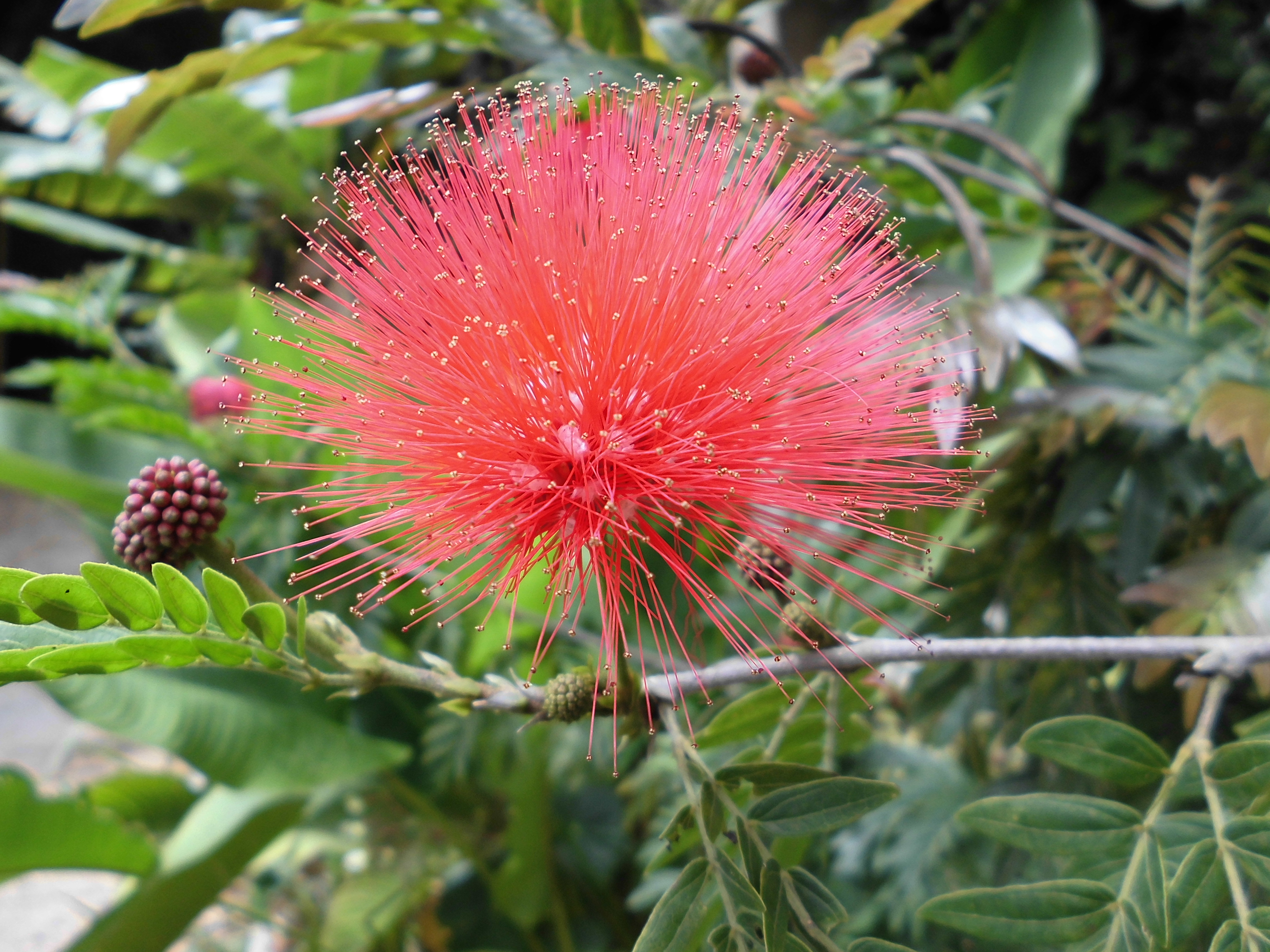 Flora de calliandra schultzii hams en su estado abierto. Se nota el tallo del árbol. Identification issue: calliandra schultzii syn. of Calliandra schultzei ? calliandra schultzei syn. of Calliandra riparia GRIN link : Calliandra schultzei Harms (Accepted name: Calliandra riparia Pittier) Considered a synonym The Plant List link: Calliandra schultzei Harms (Accepted name: Calliandra riparia Pittier) Considered a synonym (Source: The International Legume Database and Information Service or ILDIS) The Plant List link: Calliandra riparia Pittier (Source: The International Legume Database and Information Service or ILDIS) Tropicos link: Calliandra schultzei Harms (Syn. Calliandra magdalenae (Bertero ex DC.) Benth., Calliandra riparia Pittier) (+ sub-taxa)